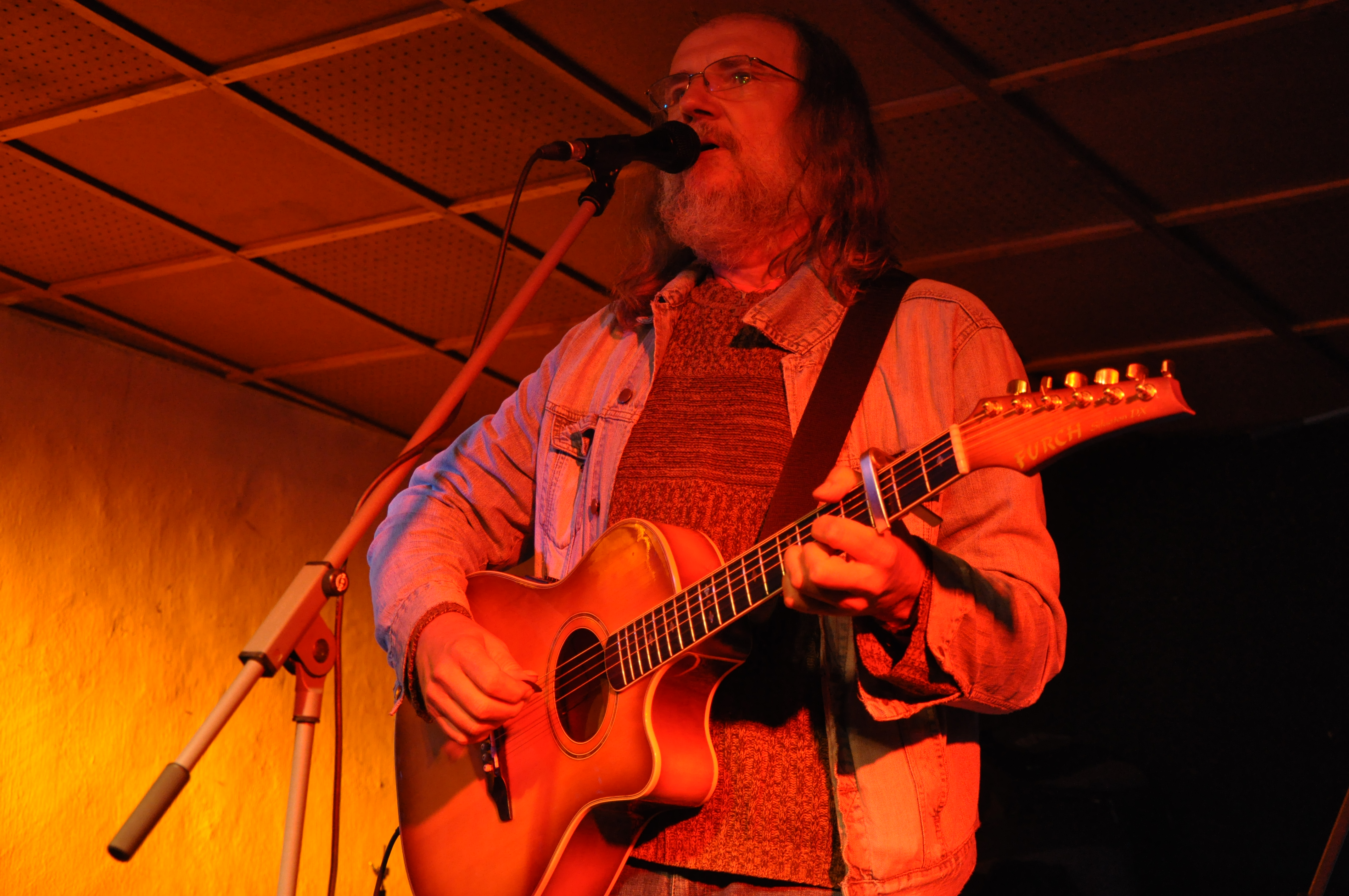 Oboroh na festivalu Otevřeno Jimramov 2009